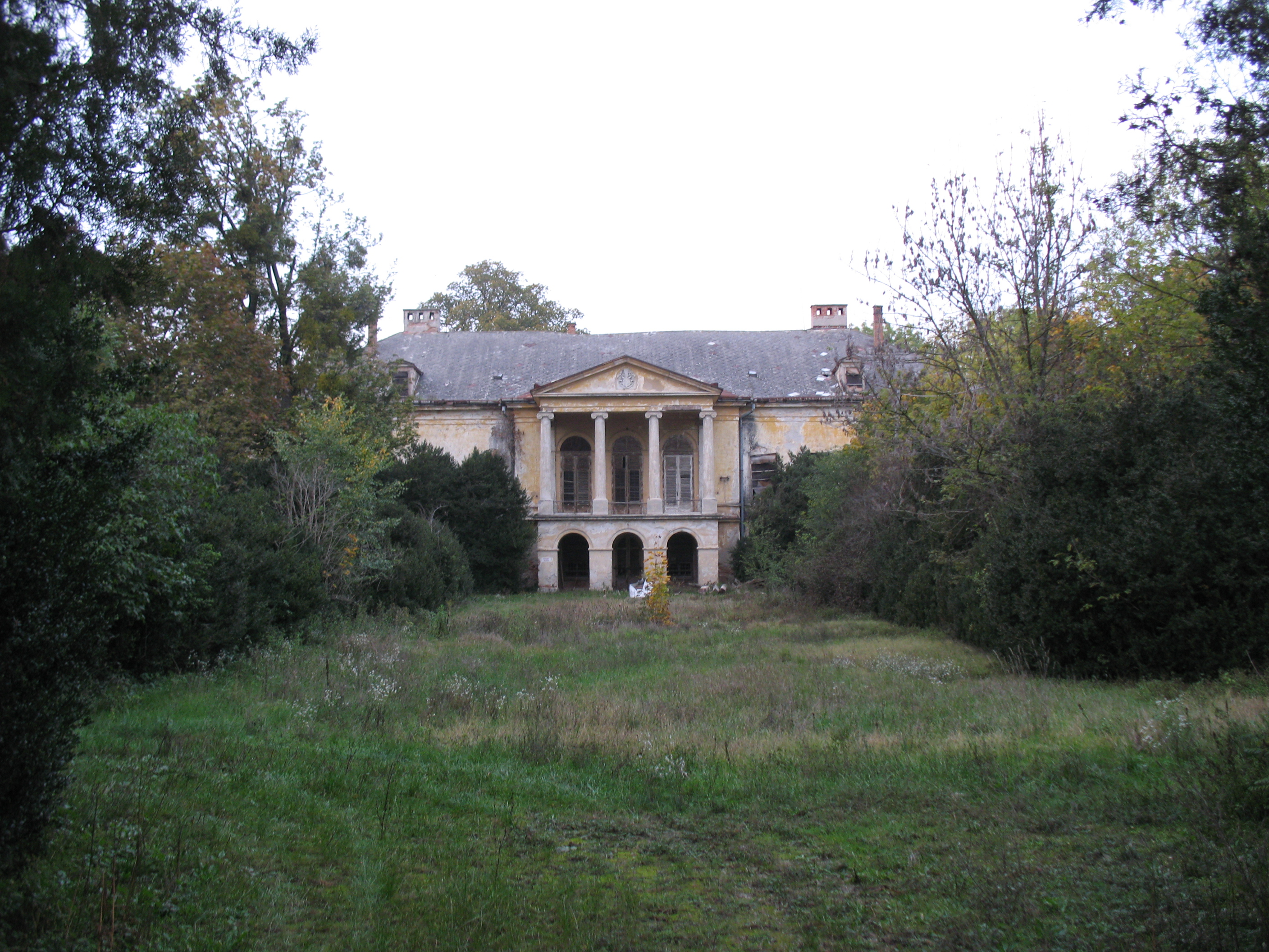 Nemesgomba